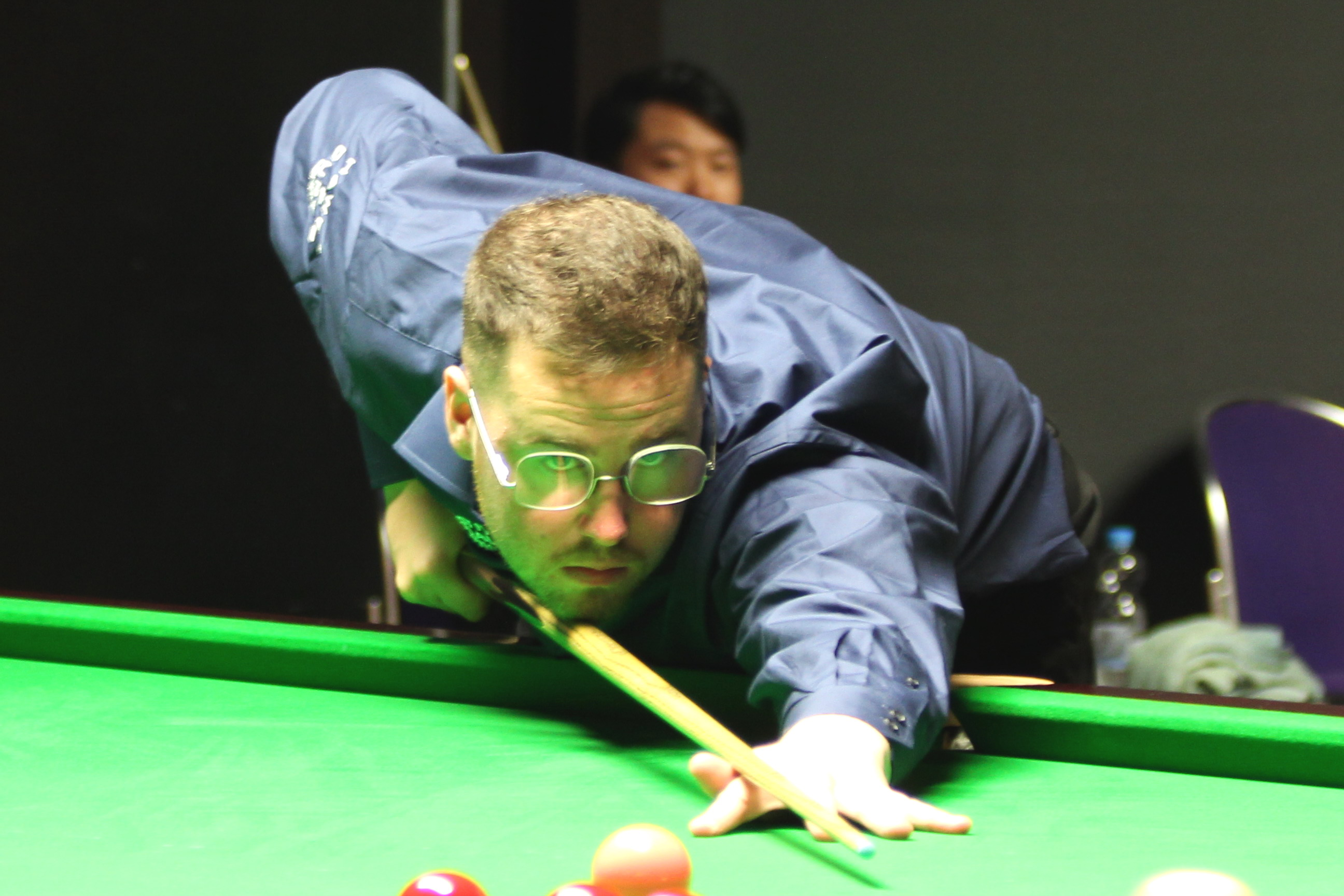 Gareth Allen beim Paul Hunter Classic 2015